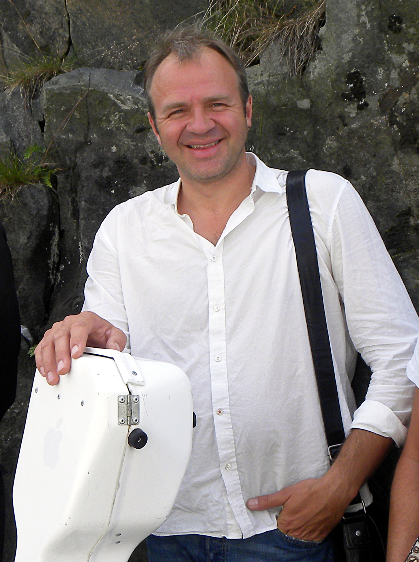 Bård Henrik Bosrup er en norsk cellist